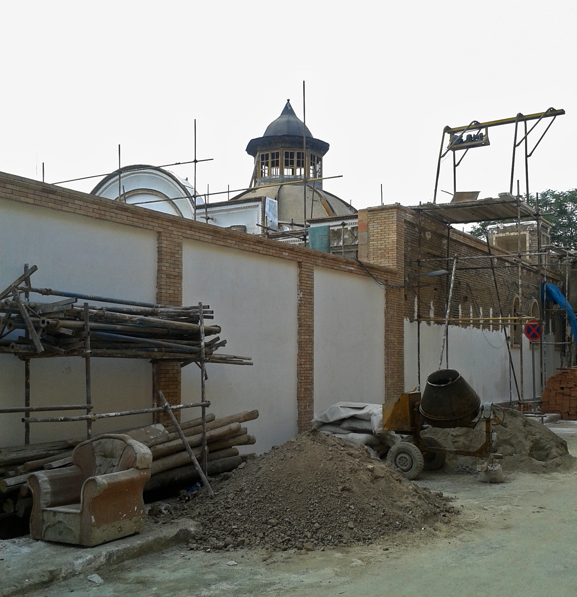 Tehran's historic Naser-al-Din Mirza House was built in 1906, in Qajar Dynasty.